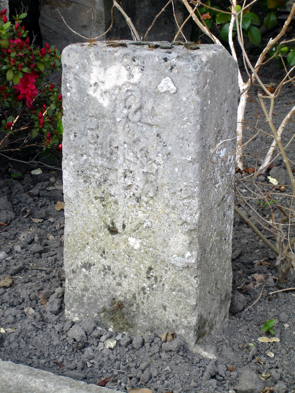 Borne armoriée devant la mairie de Coubron (Seine-Saint-Denis), France